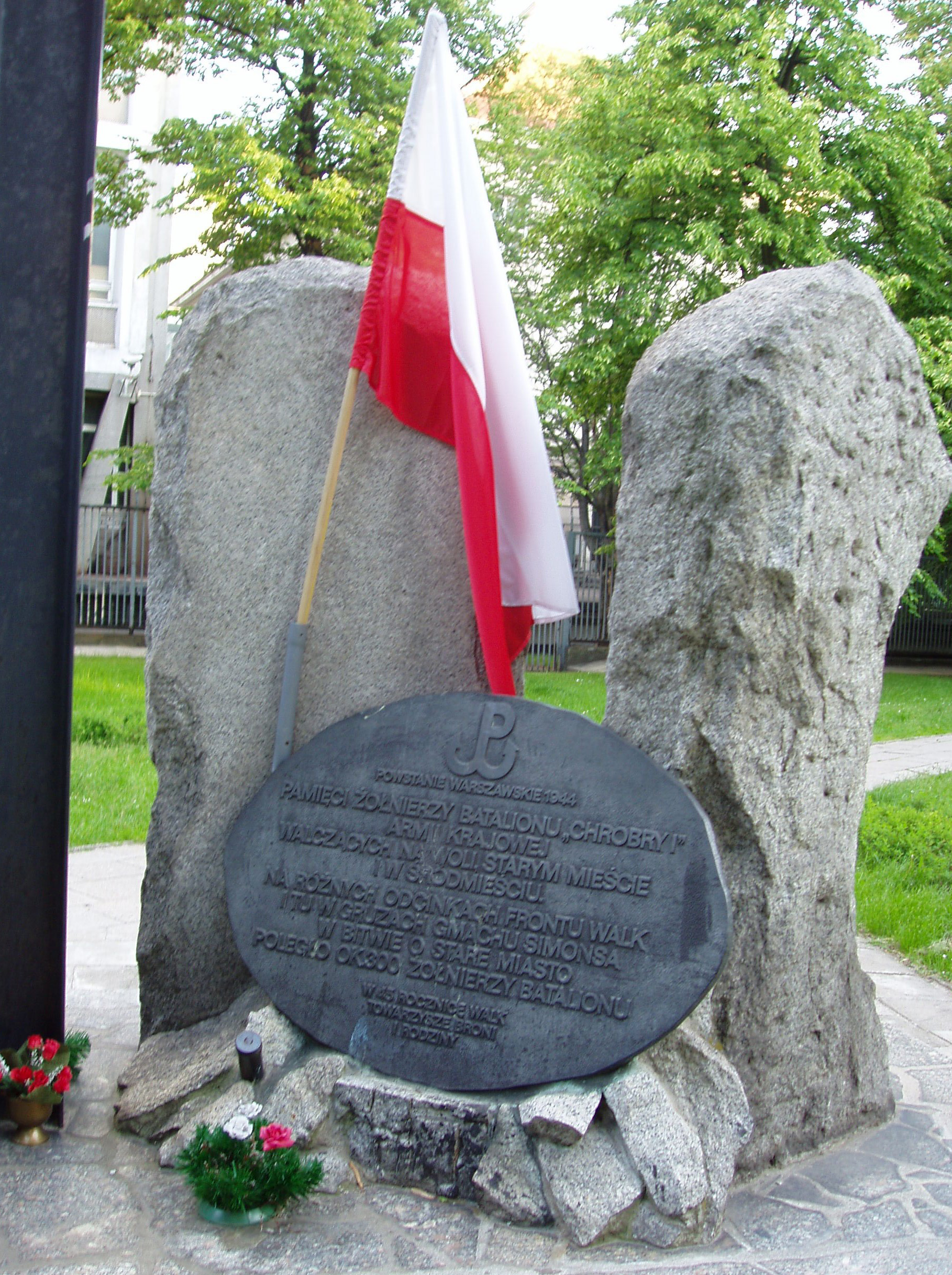 Pamięci batalionu Chrobry, rejon Arsenału w Warszawie (fot Zu)